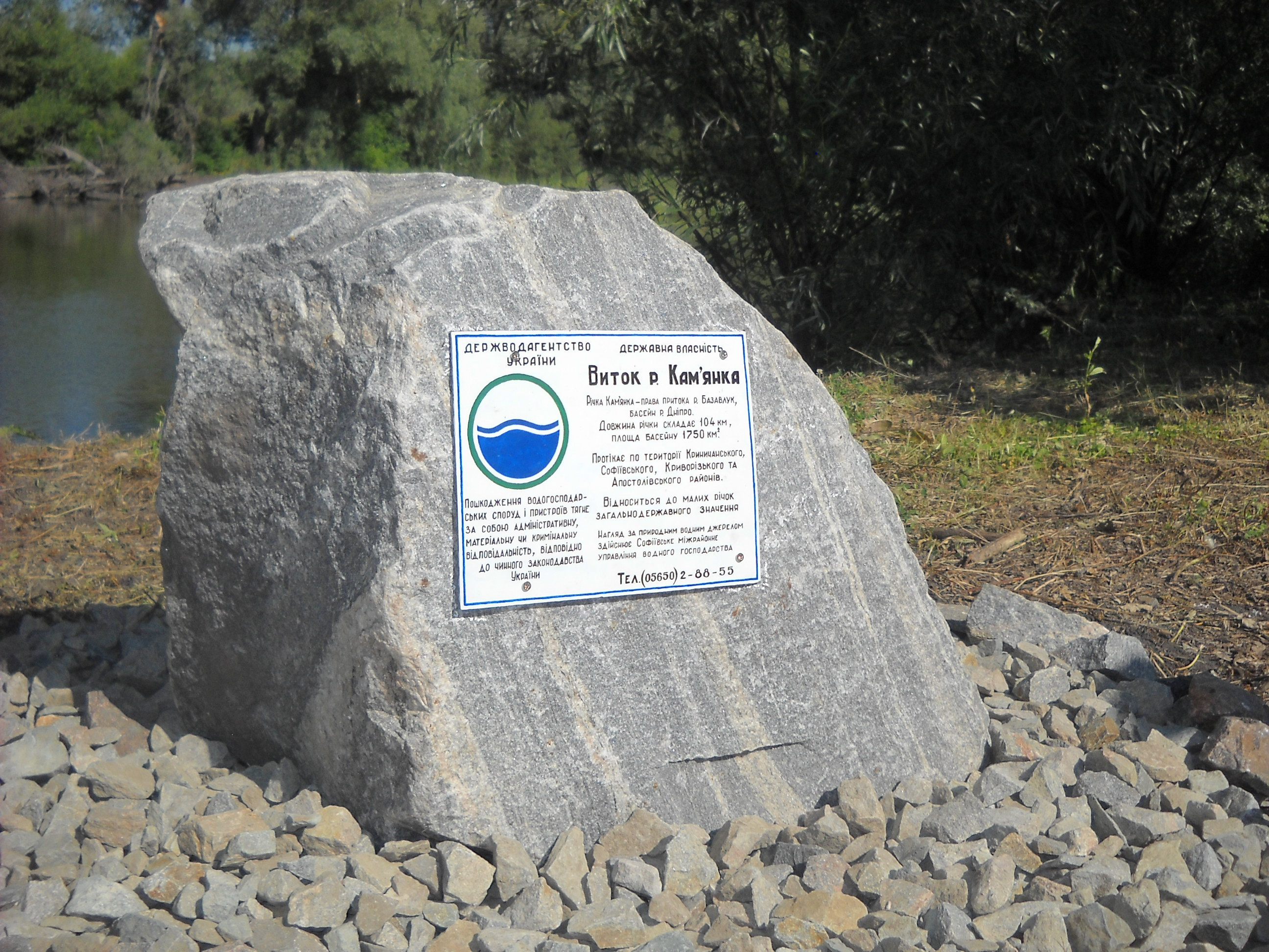 Знак "Виток річки Кам'янка"